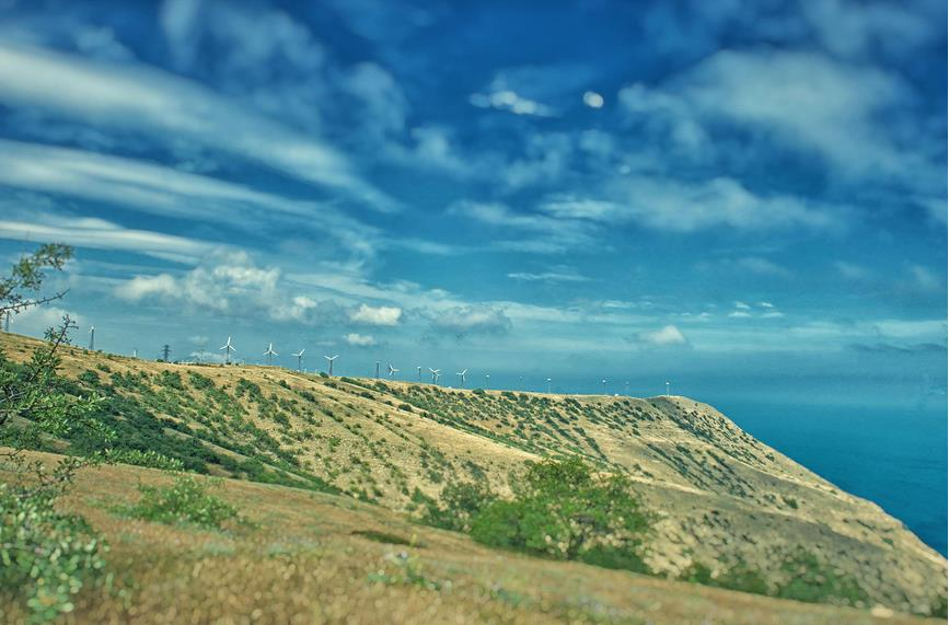 Ветряные электростанции на Меганоме